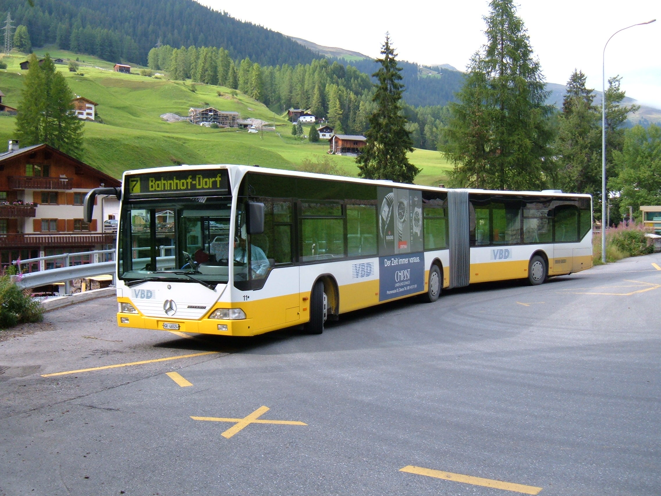 Bus 11 steht während seinem 8-Minuten-Aufenthalt auf den Kehrplatz in Glaris Ortolfi.